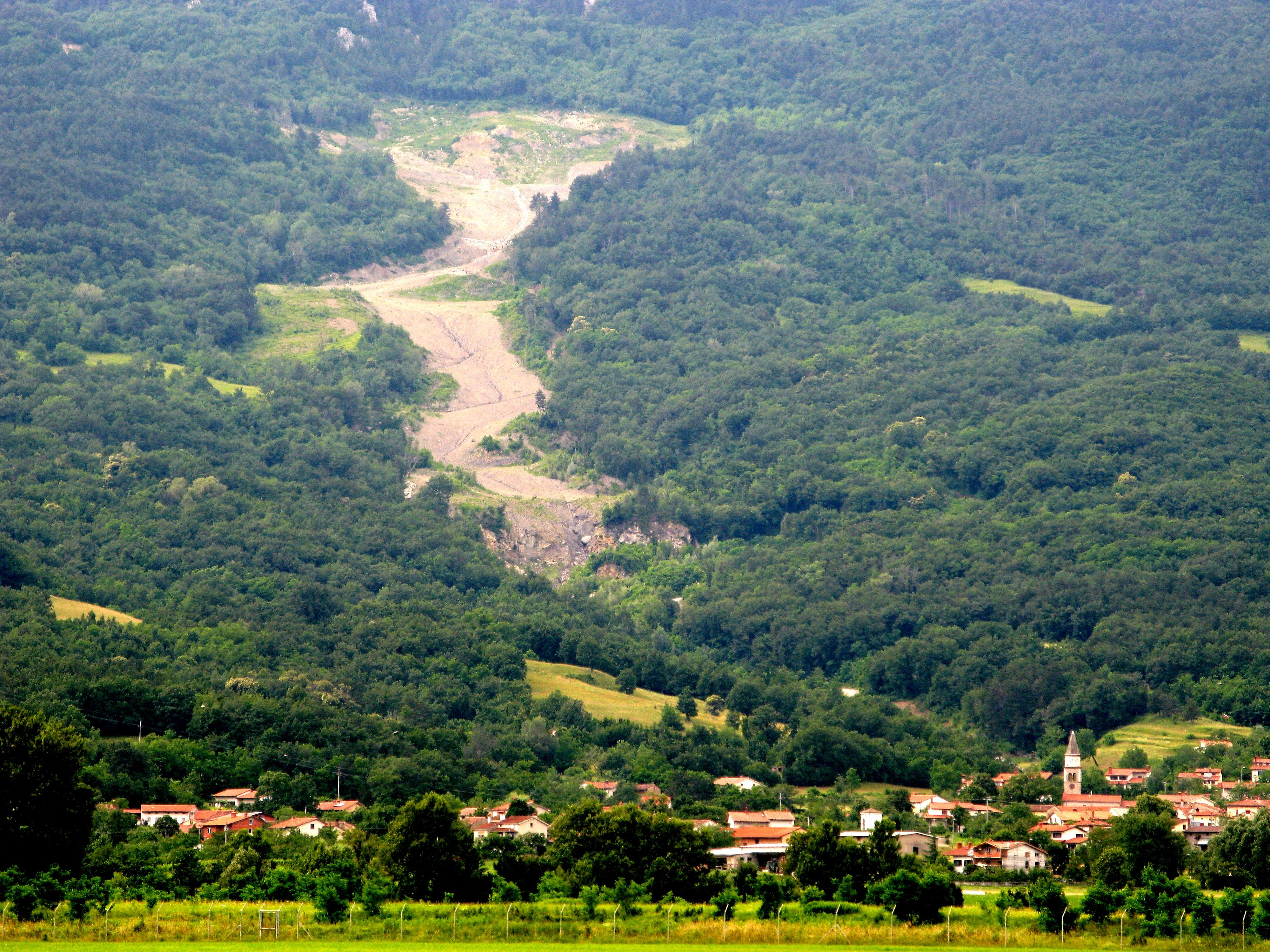 Slano Blato, a landslide above Lokavec (Municipality of Ajdovščina)